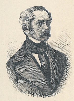 Artillerikaptajn og forfatteren August Baggesen. 1795-1865.